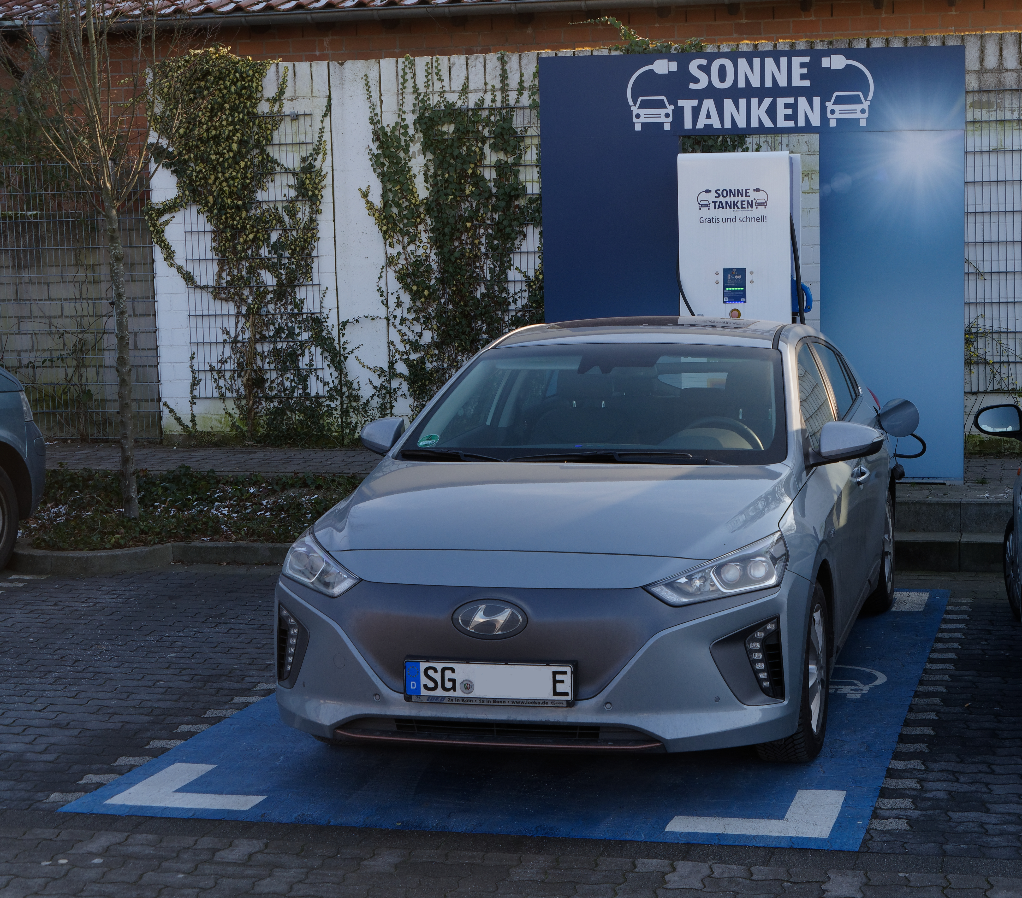 Hyundai Ioniq an einer Ladestation von ALDI Süd in Hilden